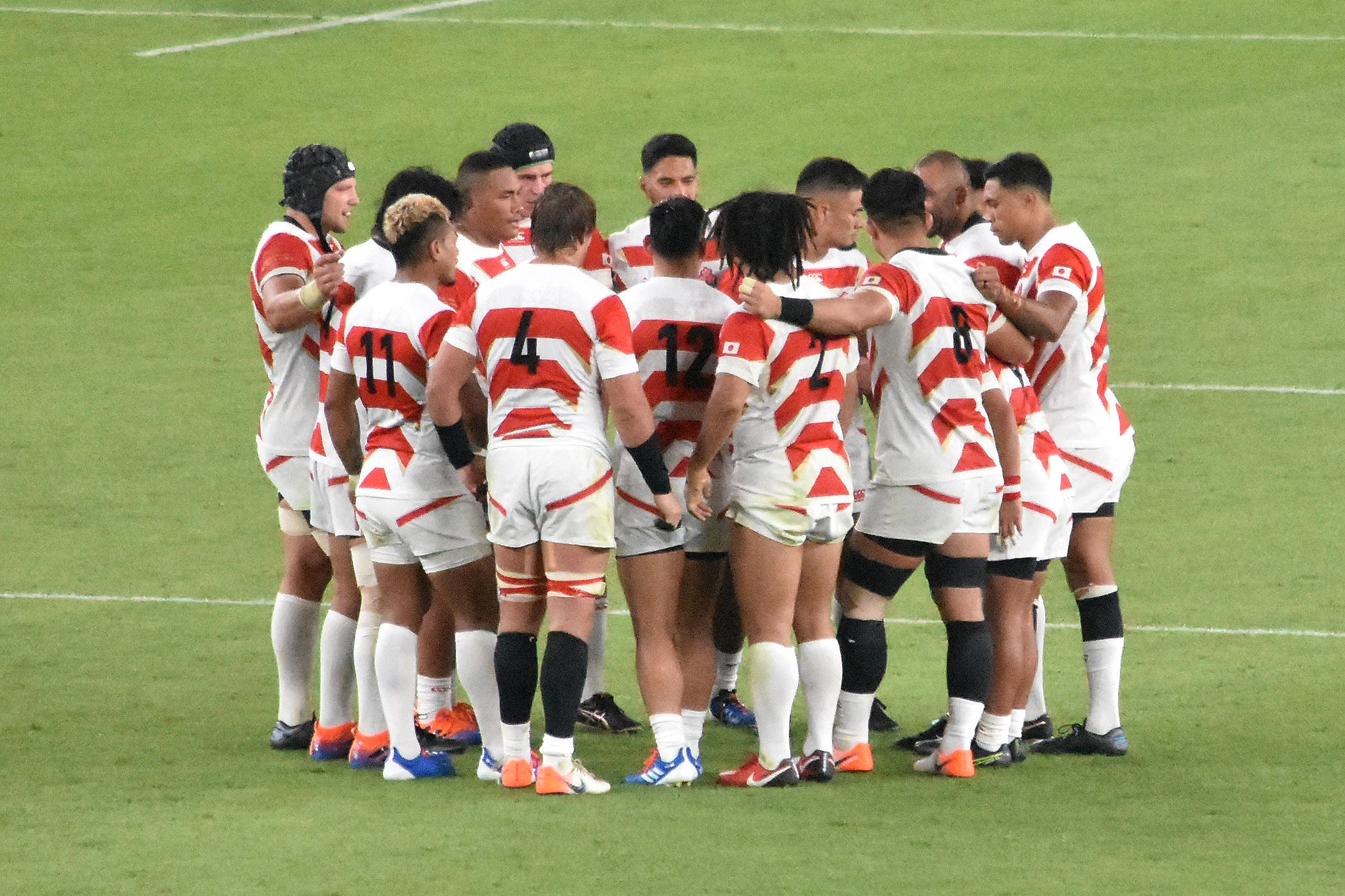 ラグビーワールカップ2019 日本 vs ロシア